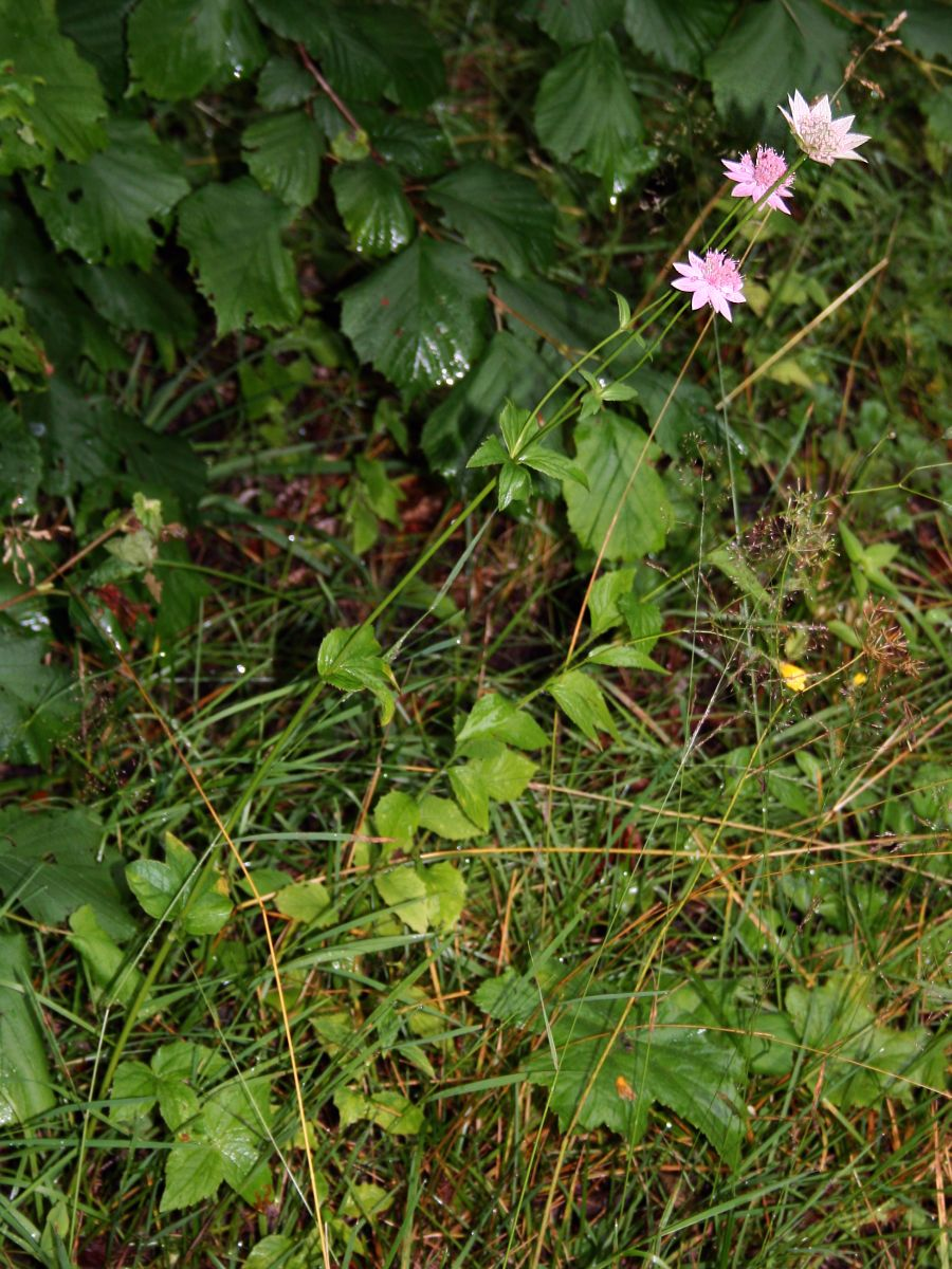 Astrantia maxima subsp. maxima, Doldenblütler (Apiaceae) – Georgien/საქართველო: Kleiner Kaukasus, S Bakuriani/ბაკურიანი, ca. 1825 m s.m.